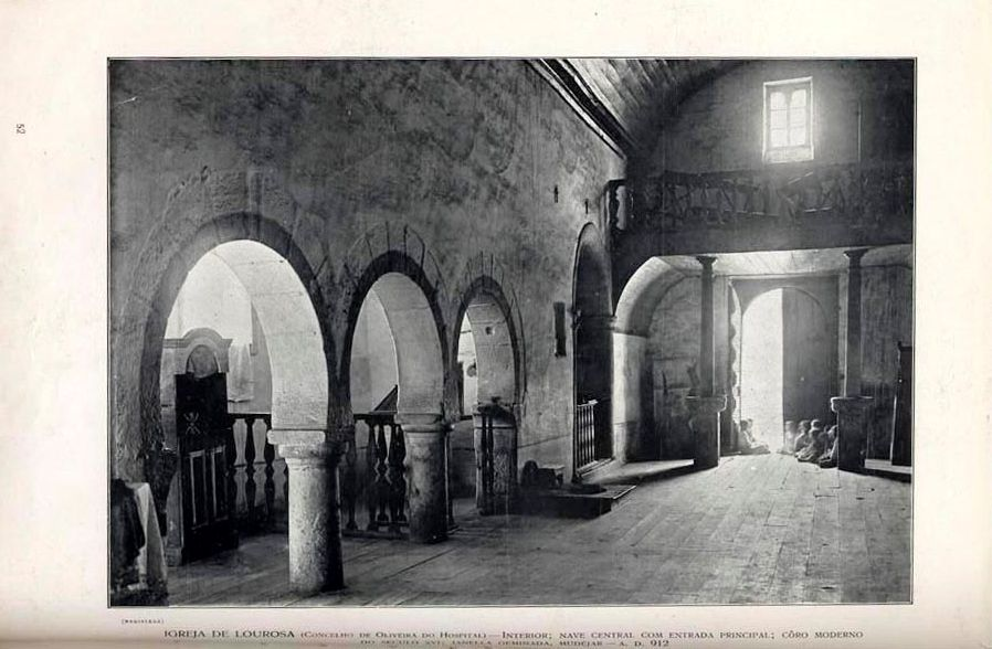 Fig. 10: Vista interior da igreja, antes das obras de 1930: vista do altar-mor em estilo “rococó” e do cemitério visigótico por baixo do chão da igreja; à esquerda o púlpito cujo assento em pedra se encontra actualmente na Casa Paroquial